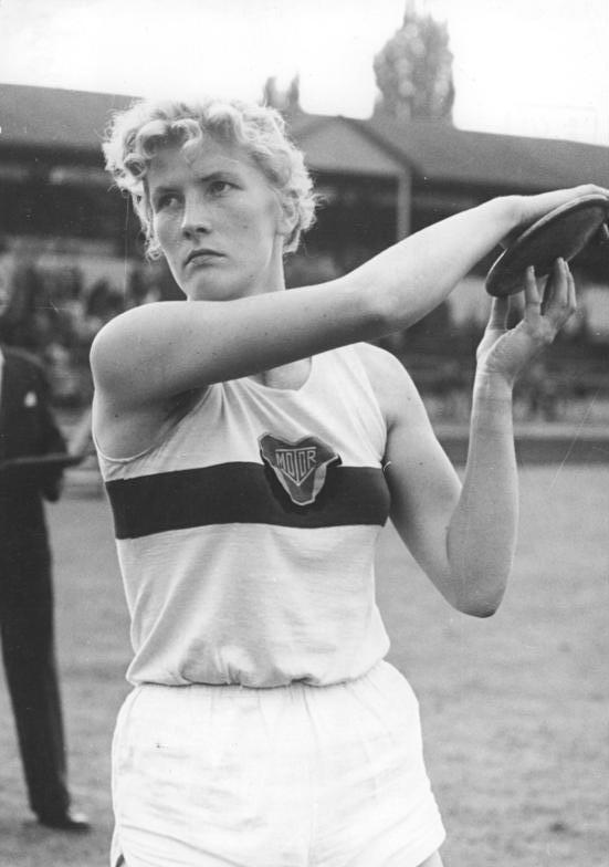 Stechemesser Zentralbild Wlocka 24.7.1956 VII. DDR-Leichtathletik-Meisterschaften in Erfurt In der Zeit vom 20. bis zum 22. Juli 1956 wurden im Erfurter Georg-Dimitroff-Stadion die VII. Leichtathletik-Meisterschaften der DDR ausgetragen. UBz: Siegerin im Diskuswerfen der Damen wurde Stechemesser (Motor Jena) .